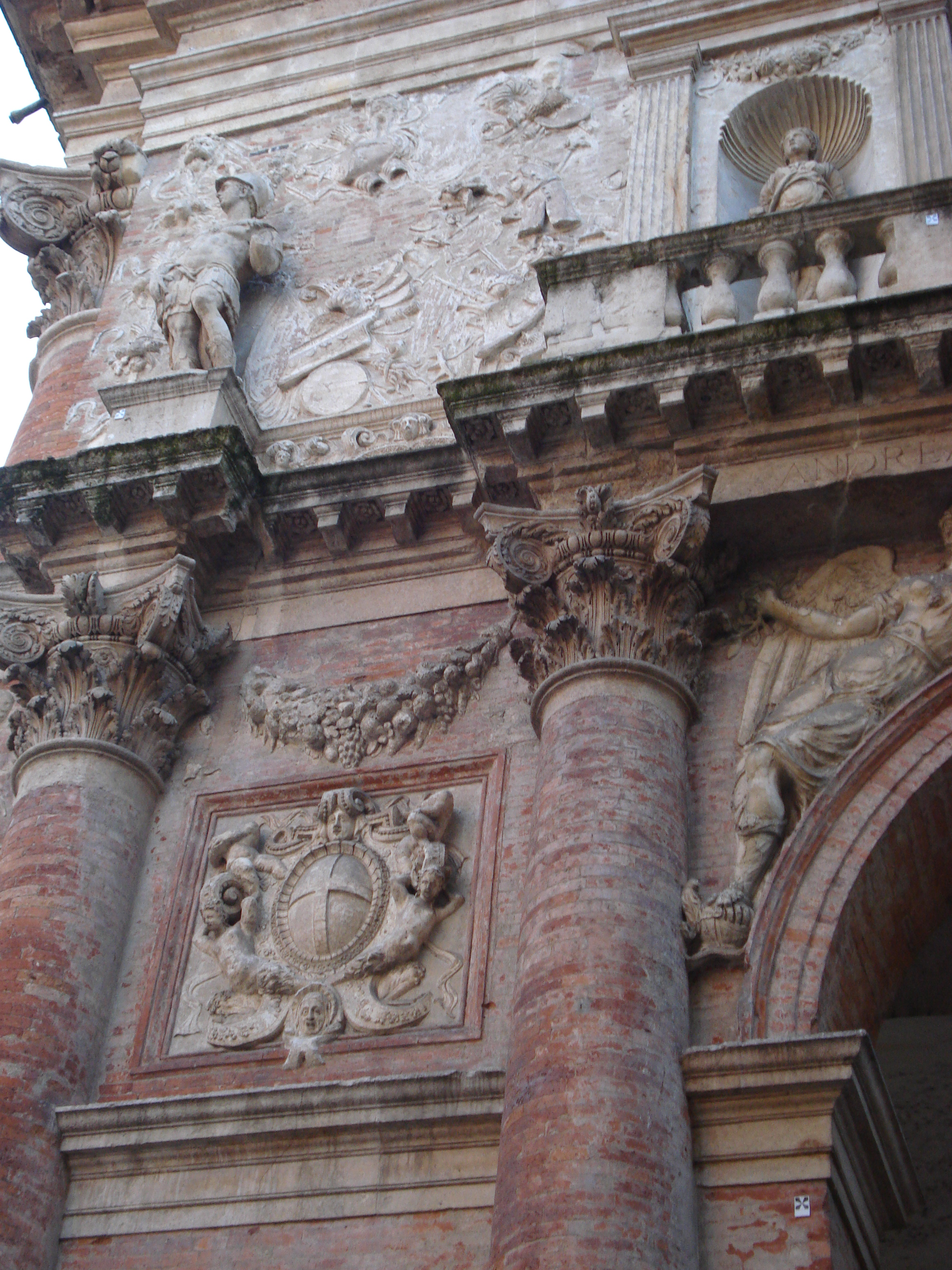 Rappresentazione delle armi dei vinti della battaglia di Lepanto, nei fregi del palazzo del Capitaniato di Vicenza.